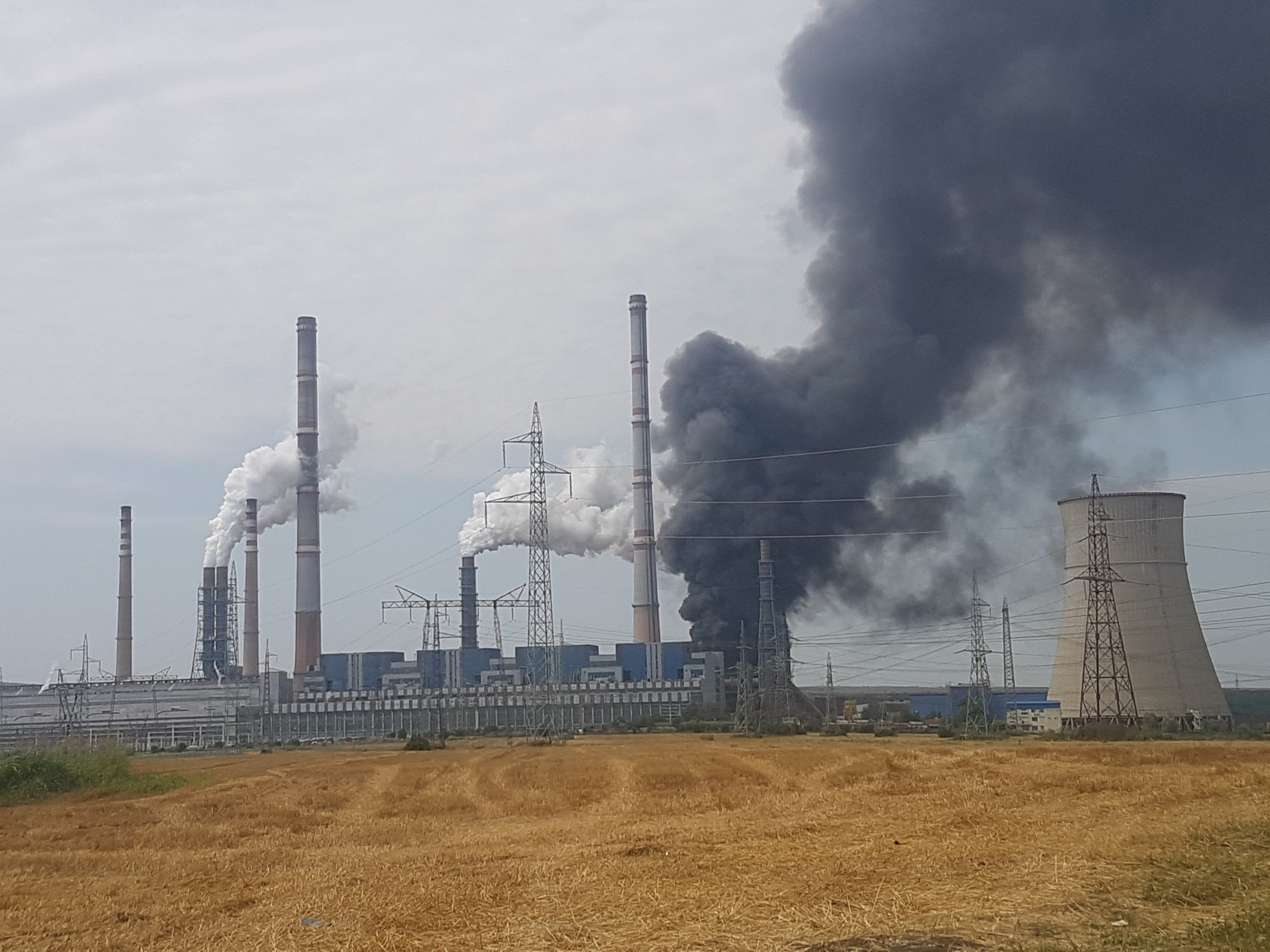 Снимка северно от централата откъм село Радецки.